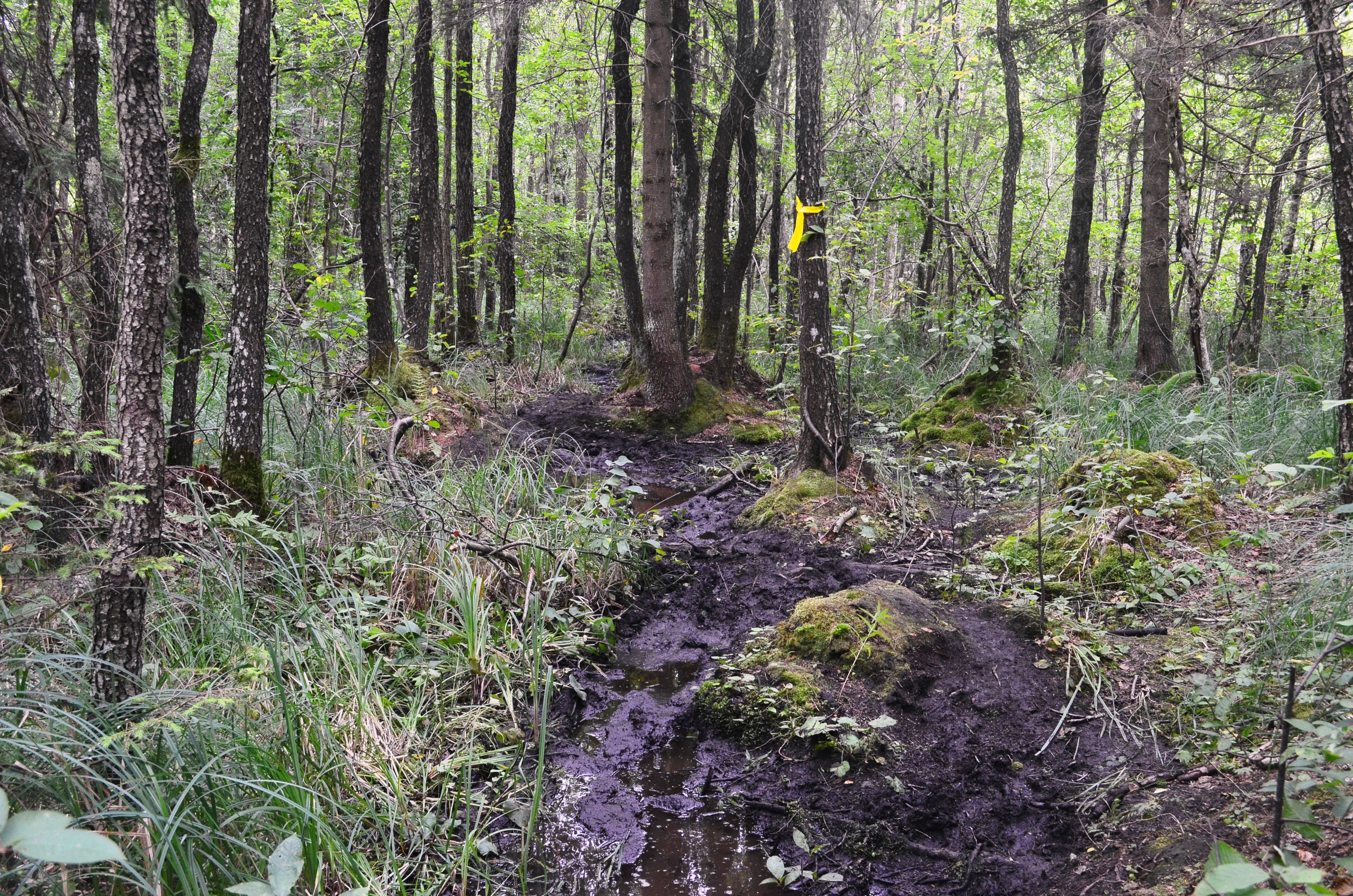 Takas į Sietuvos kūlgrindą, Varnių RP, Šilalės raj. Žemaitėška: Kel's i Sietovas kūlėgrinda, Varniu RP, Šėlalės raj.